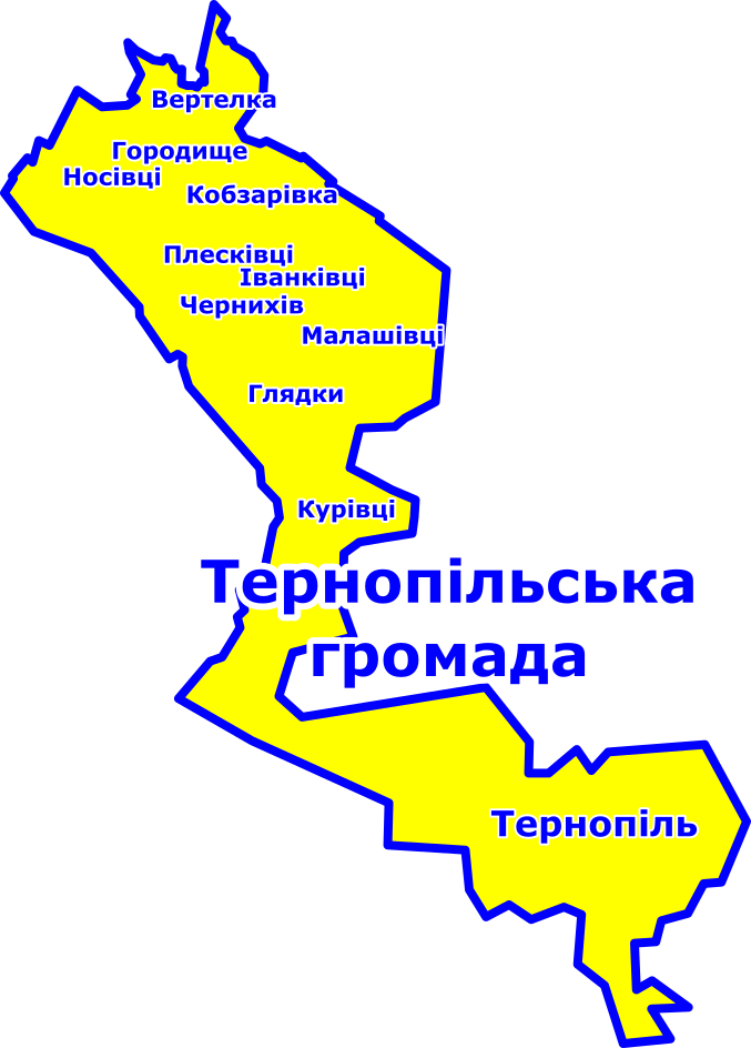 Тернопільська громада